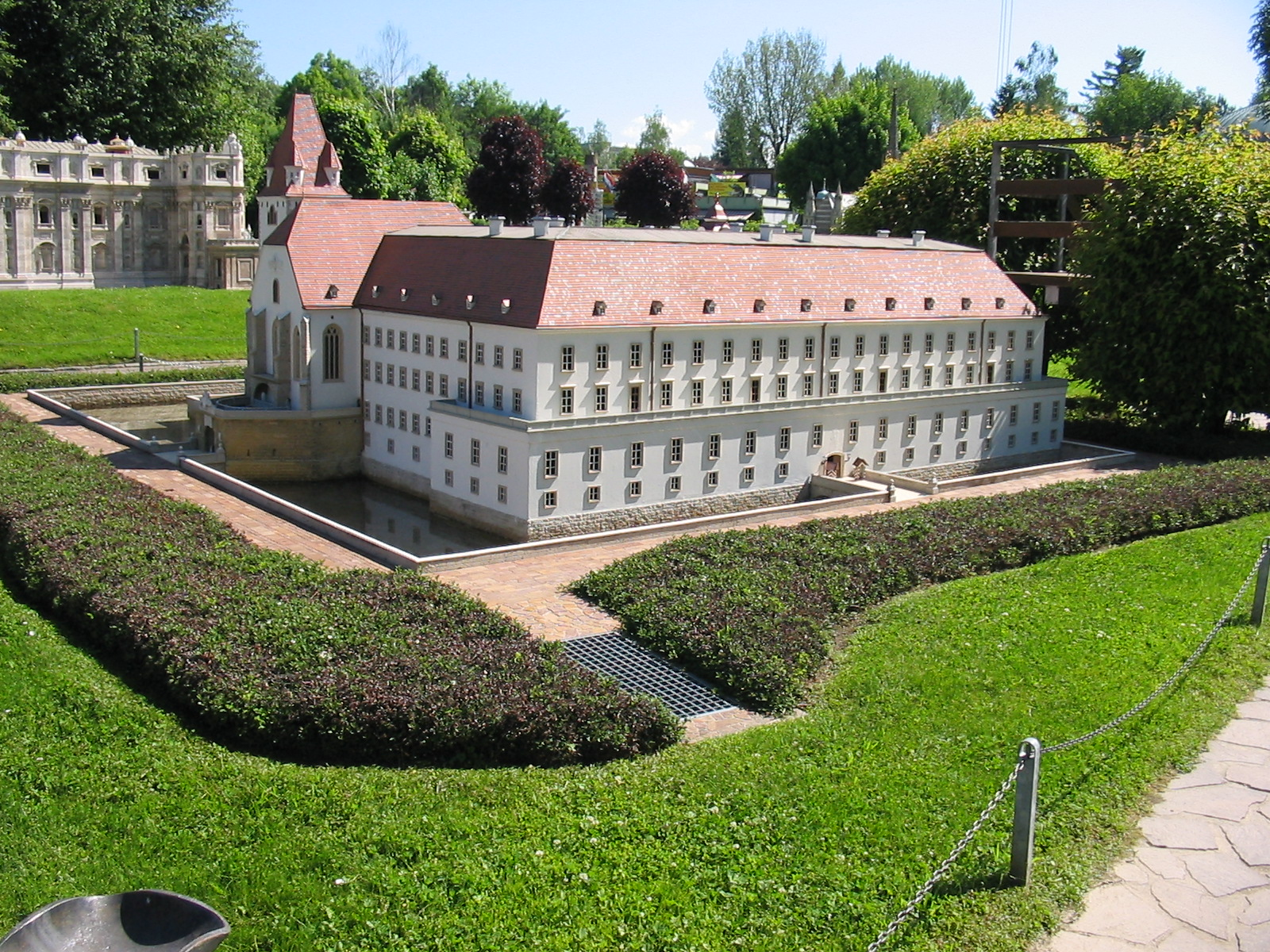 Militärakademie Wiener Neustadt at Minimundus Klagenfurt